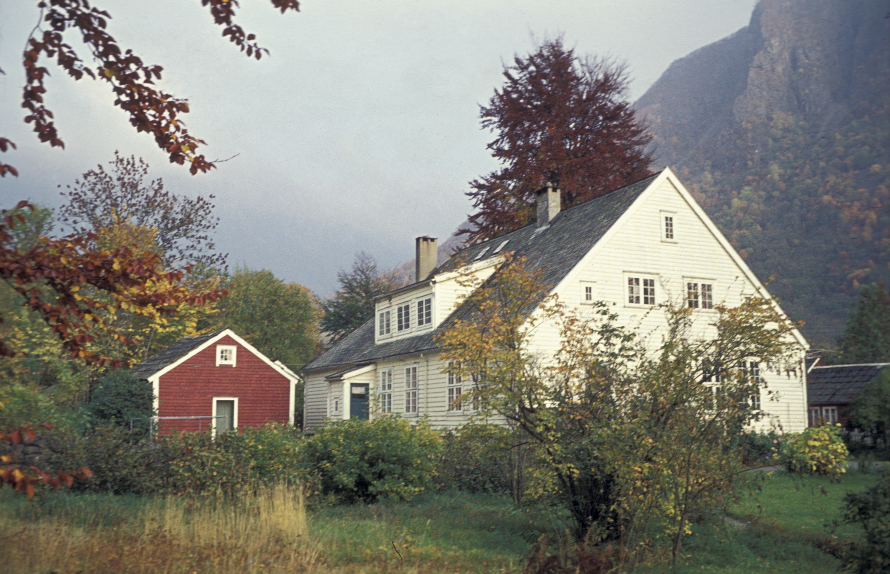 Malmanger prestegård. Foto: Ina Backer. Fra Riksantikvarens Kulturminnesøk.